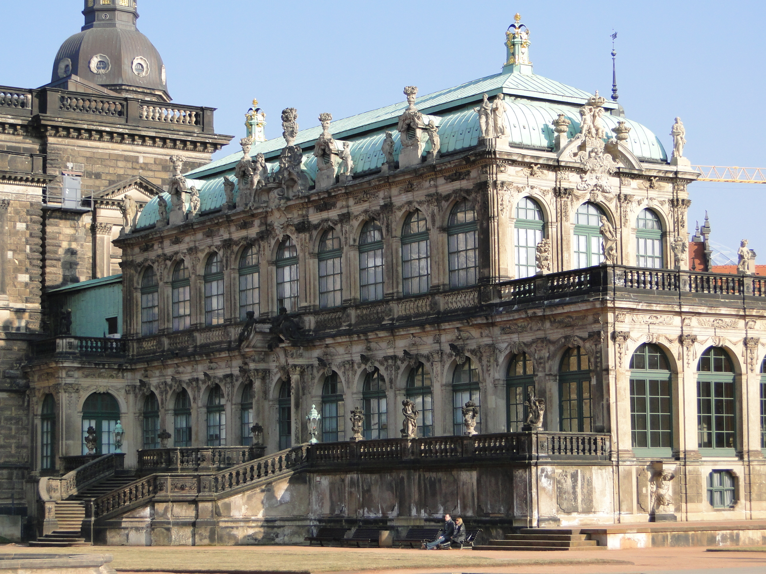 Deutscher Pavillon des Dresdner Zwingers